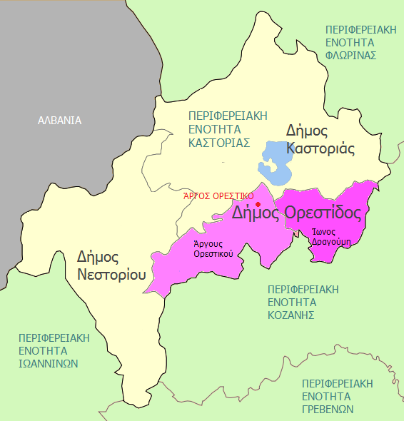 Δημοτικές ενότητες Δήμου Ορεστίδος.